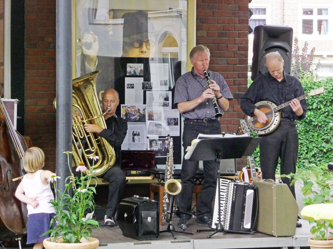 Heinz Heineberg ist em. Professor für Geographie in Münster. In seiner Freizeit widmet er sich mit Freunden der Jazzmusik. Foto: Barbara Heineberg